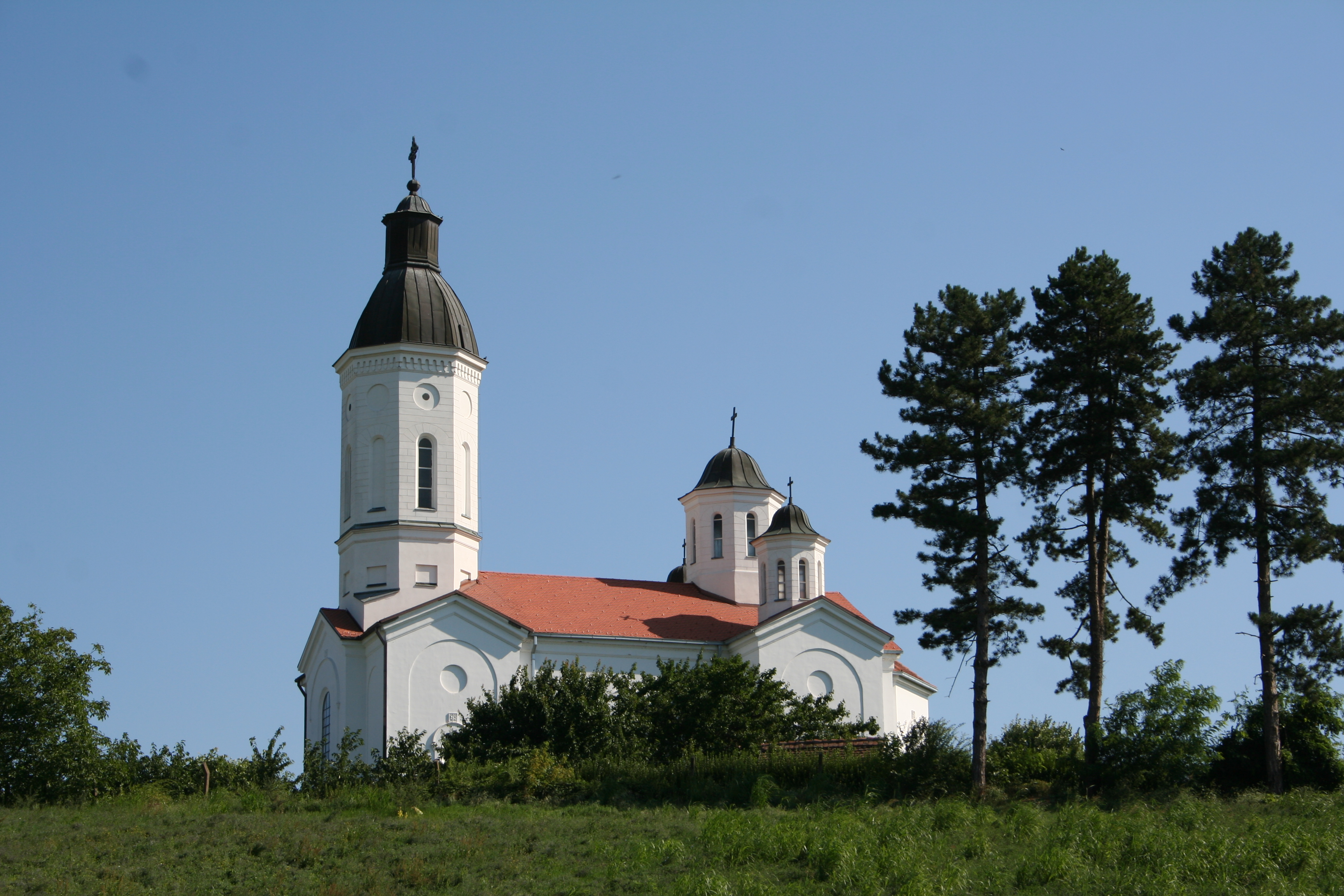 Crkva Uspenja Presvete Bogorodice, Orid